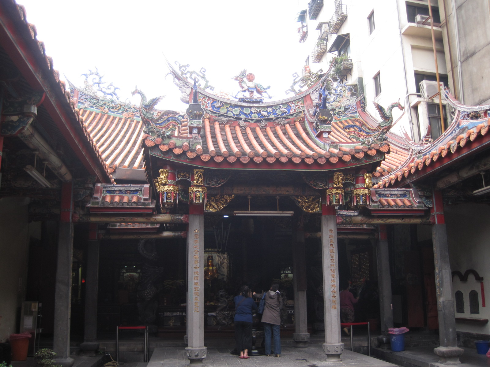 淡水龍山寺